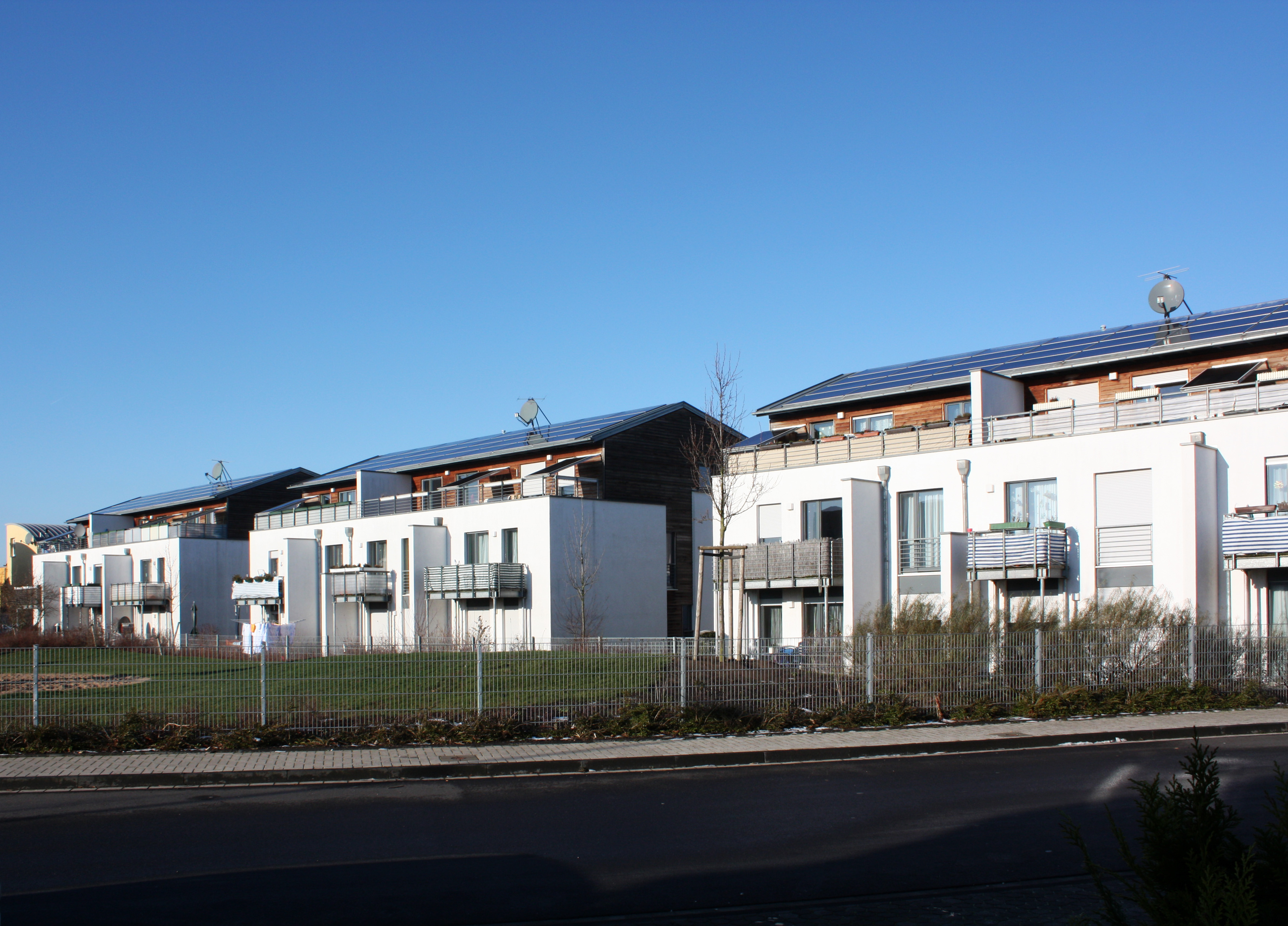 Lechenich, Stadtdetail